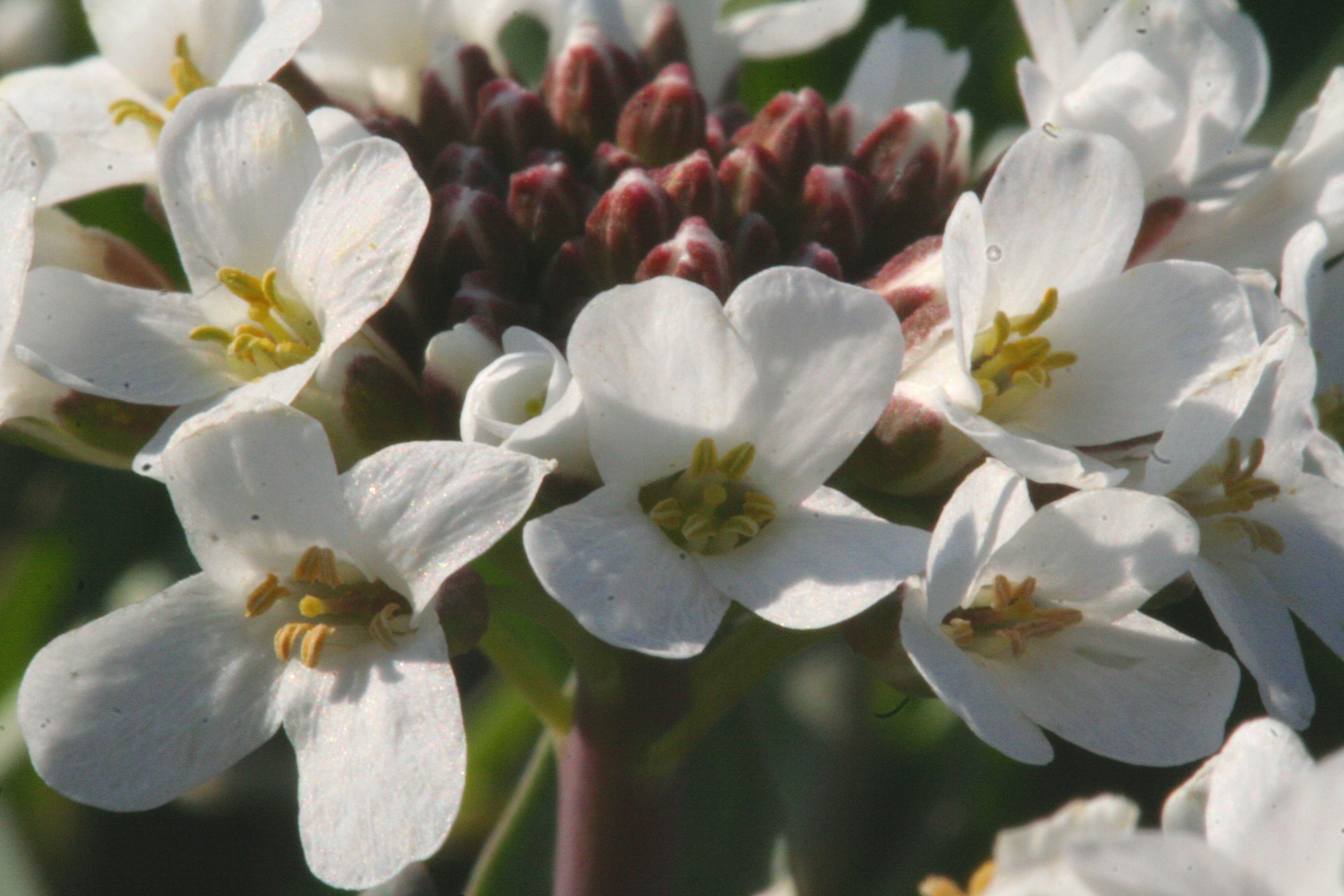 Erba storna montanina - Località : Pellegai, Mel (BL), 503 m s.l.m.